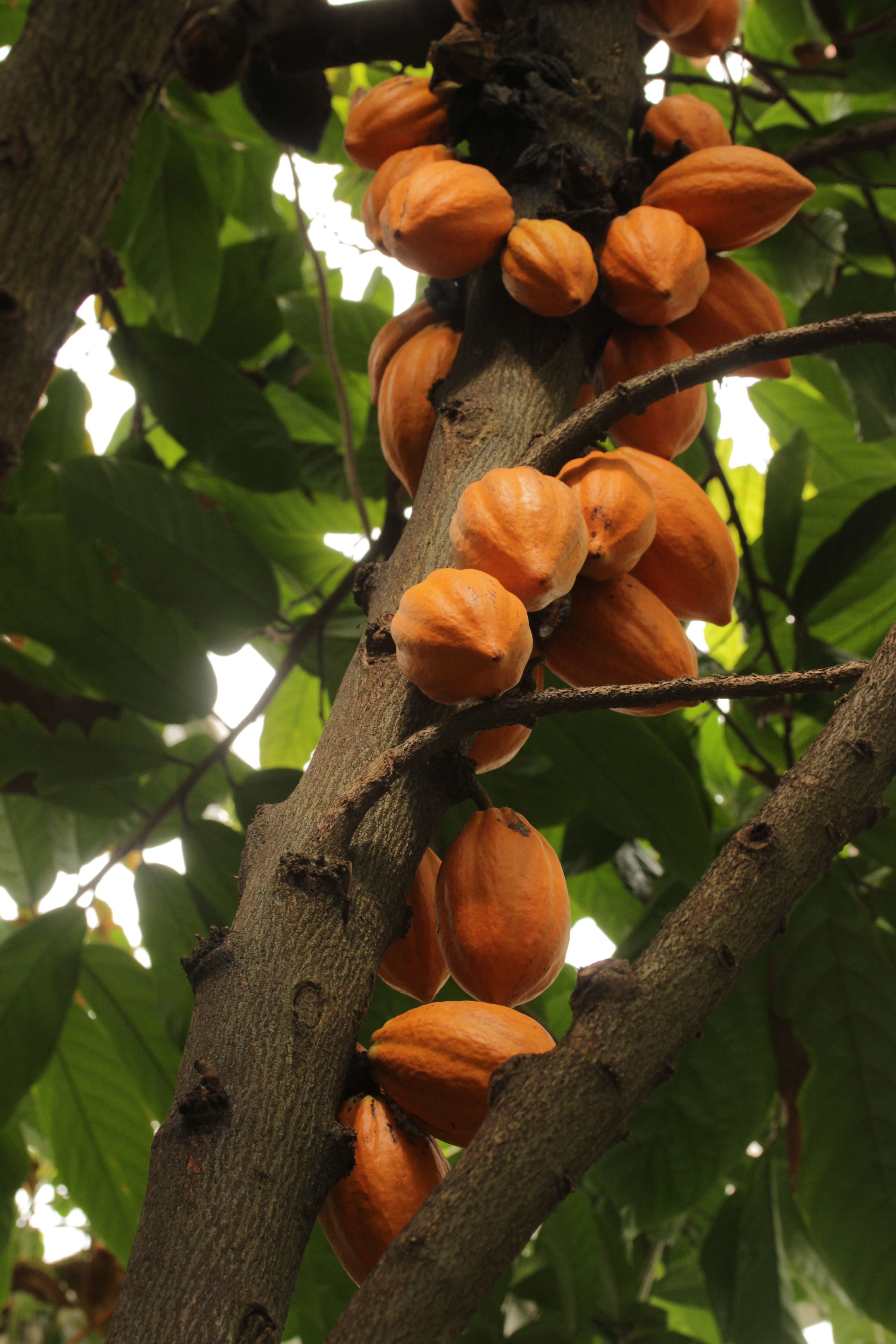 Cacao Tree - Theobroma cacao